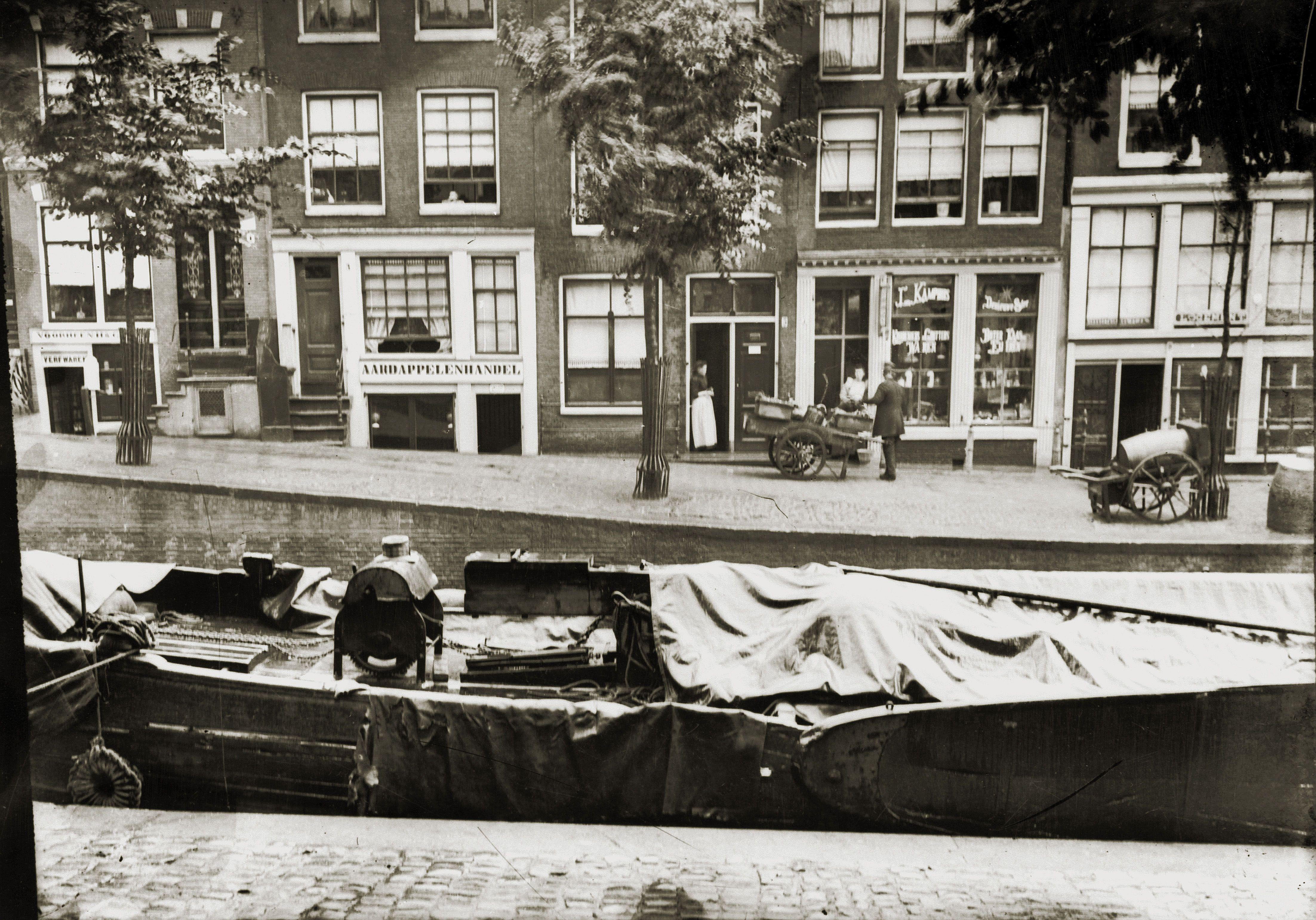 Beschrijving Lauriergracht 1-9 (v.l.n.r.) Documenttype foto Vervaardiger Breitner, G.H. (George, 1857-1923) Collectie Collectie G.H. Breitner Datering 1895 Geografische naam Lauriergracht Inventarissen Afbeeldingsbestand 010104000079 Generated with Dememorixer